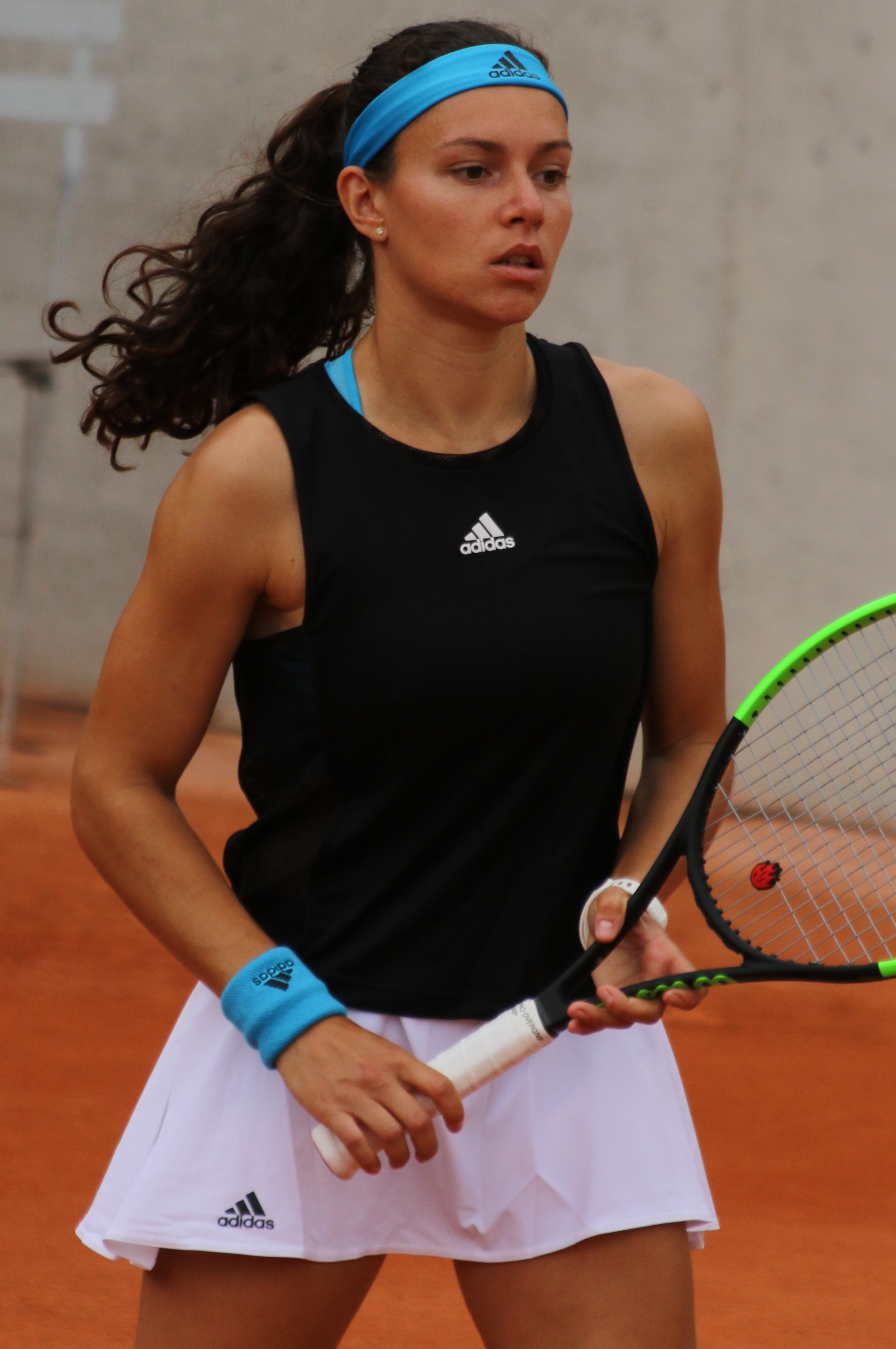 Cascino RG19 (13)